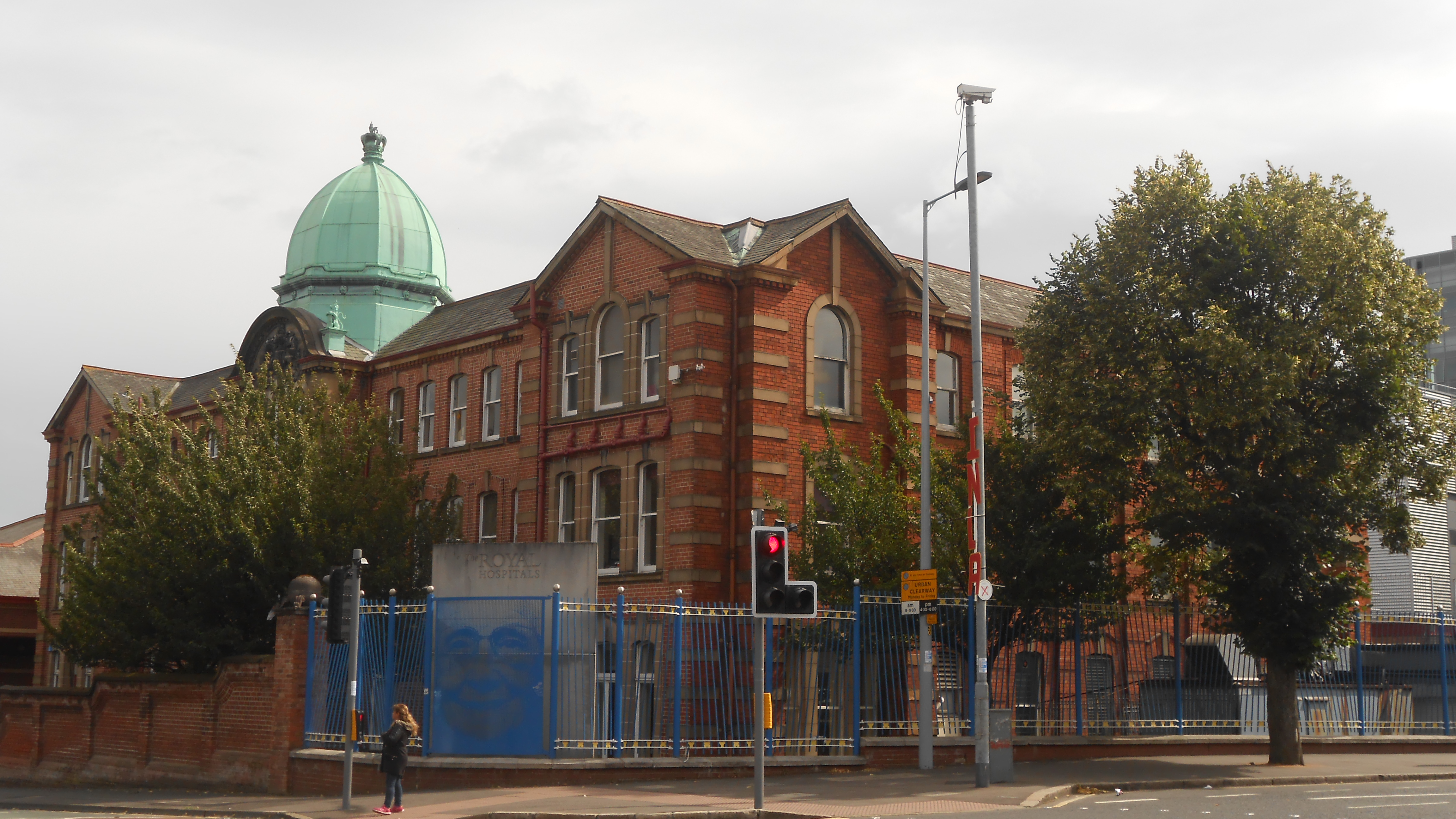 Teilansicht des Royal Hospitals in Belfast, im irisch-republikanisch dominierten Stadtteil Falls Road.